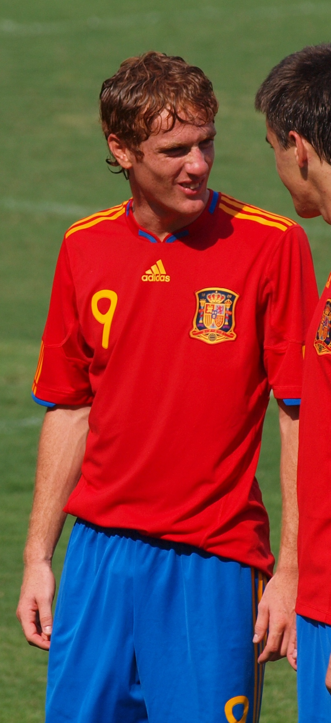 Alejandro Fernández Iglesias "Alex"